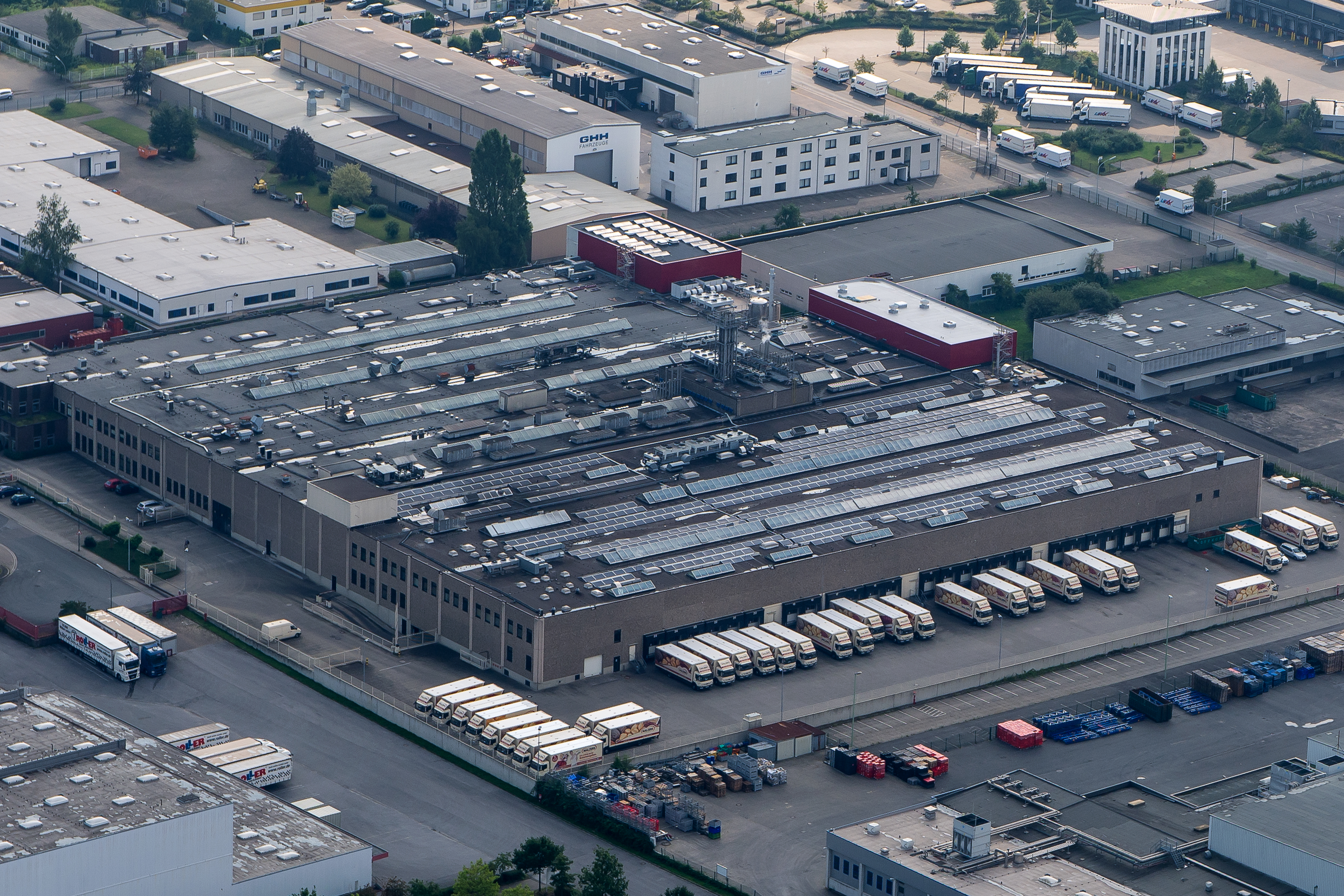 Das Haupt-Verwaltungsgebäude der MALZERS Backstube GmbH & Co. KG in Gelsenkirchen-Erle.